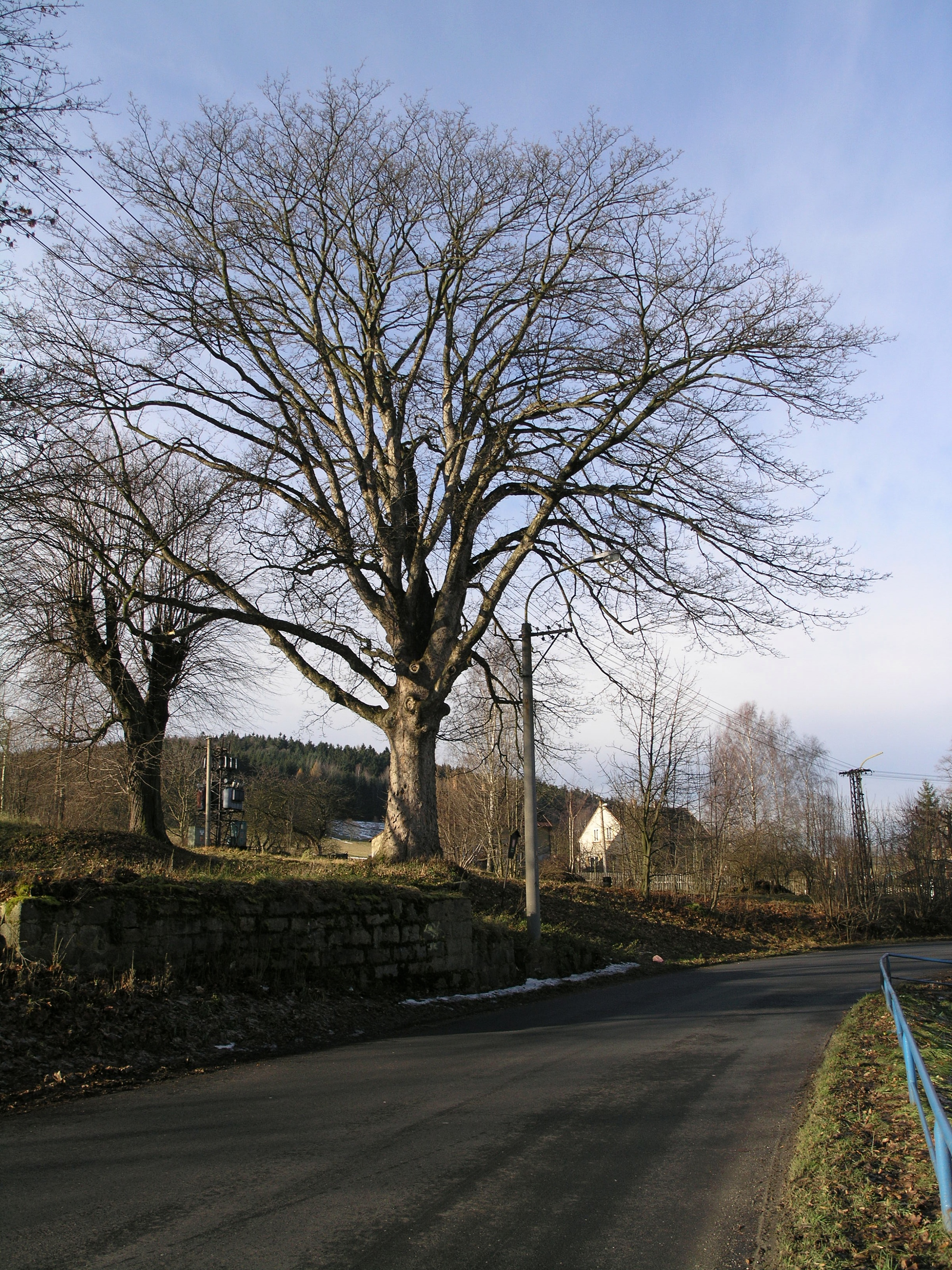 Mikulášovice - památný javor klen